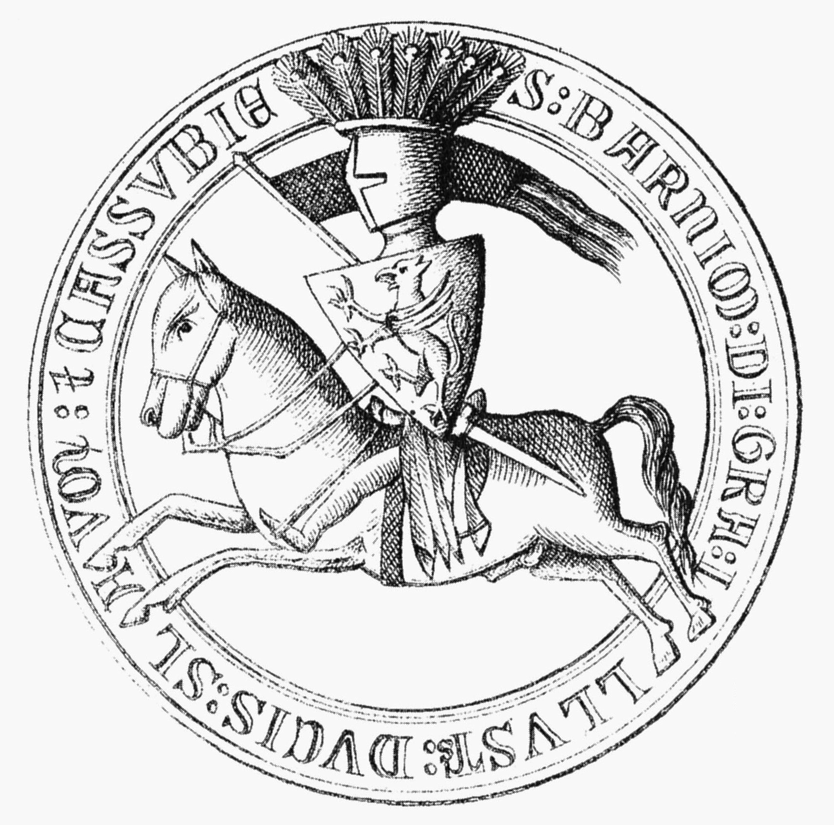 Siegel von Herzog Barnim I. von Pommern